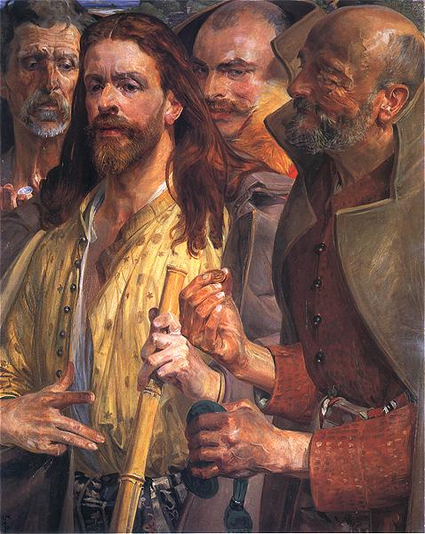 Jacek Malczewski (1854-1929) – polski malarz symbolista. Grosz_czynszowy